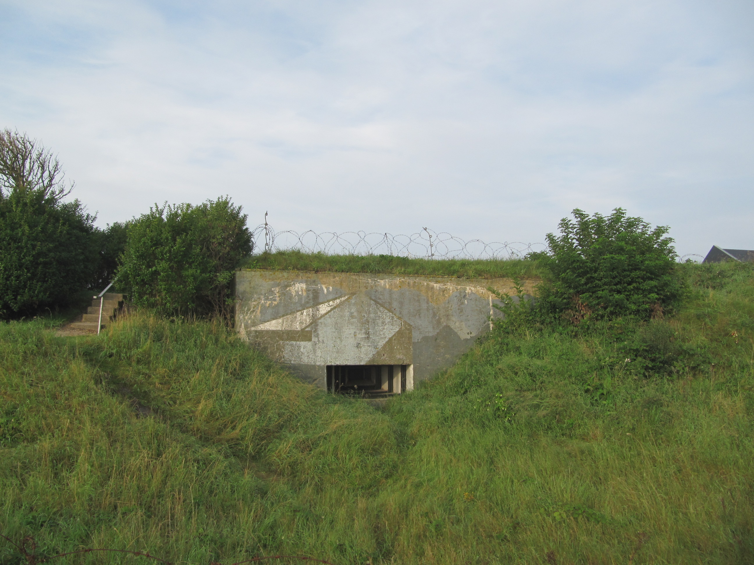 RM516500 - Kornwerderzand.jpg